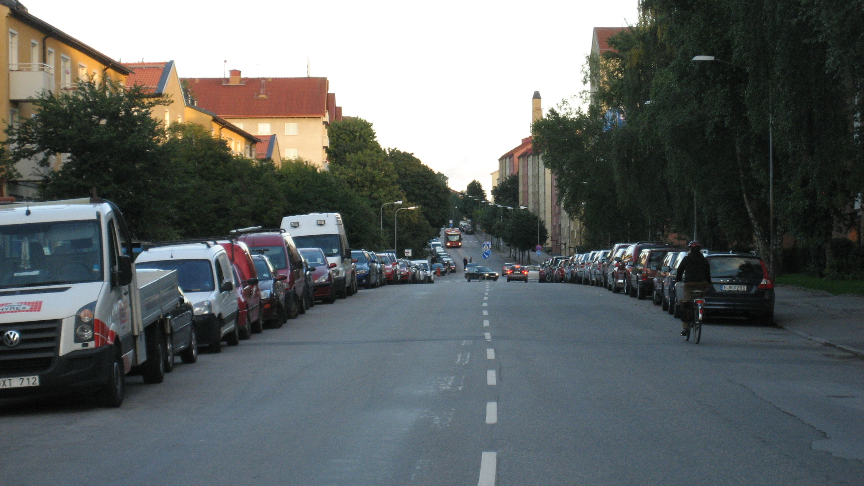 Årstavägen sedd från korsningen med Ottsjövägen. Skorstenen på huset i mitten revs i oktober 2012. Årsta, Stockholm.